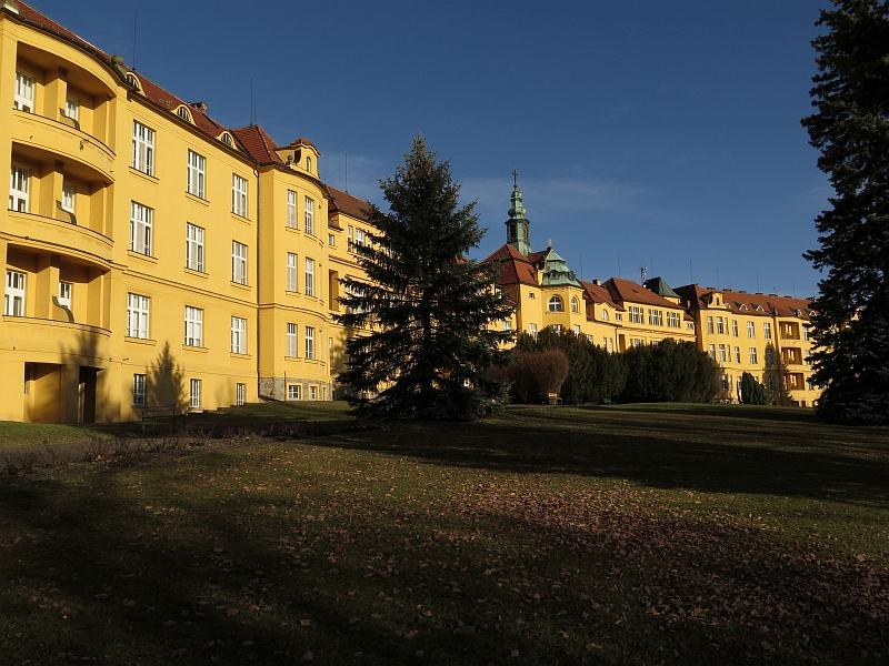 Léčebný ústav TRN Na Pleši, Nová Ves pod Pleší.